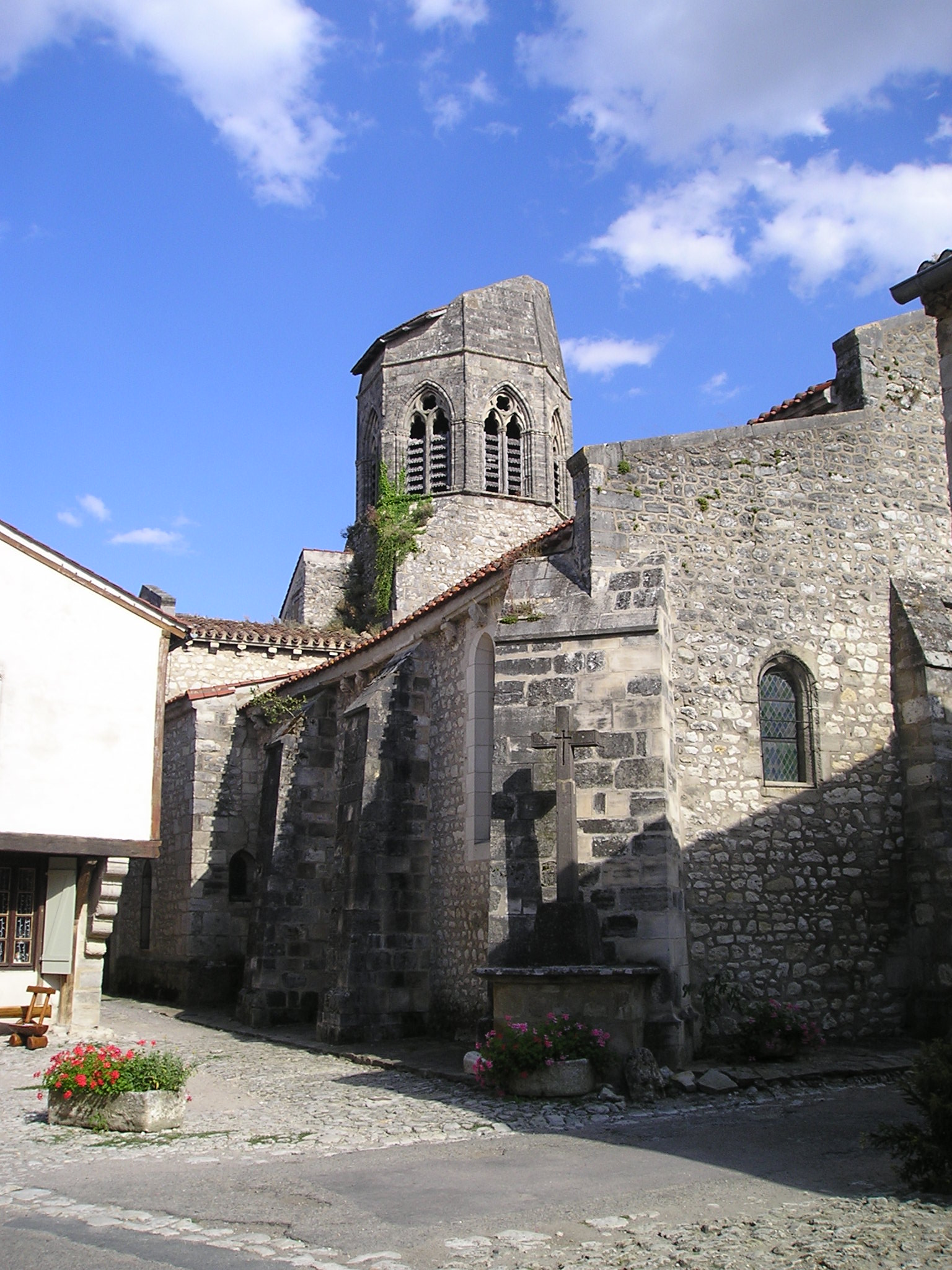 Charroux, Kirche Saint-Sébastien